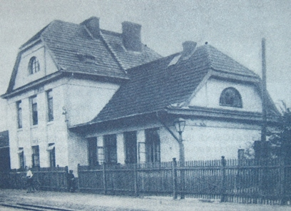 Stacja kolejki wąskotorowej w Otwocku po 1915